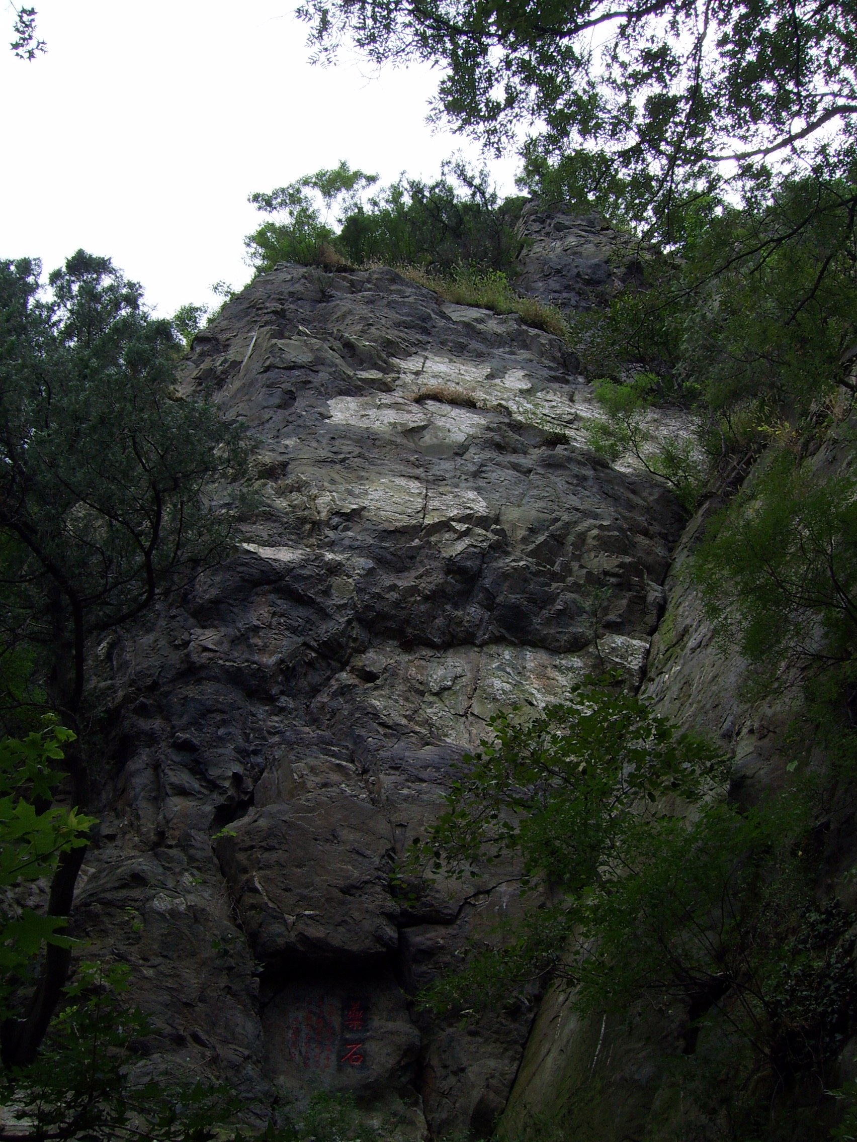 香山公园内静宜园二十八景之一森玉笏